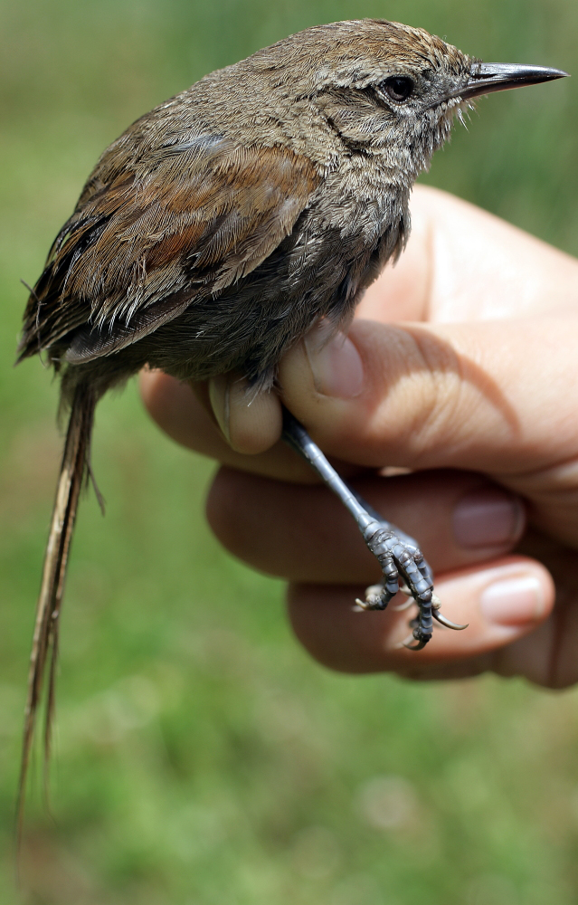 Asthenes perijana Birds of Serranía de Perijá of Colombia and Venezuela (Ornitologia Colombiana [2014] 14: 62–93)